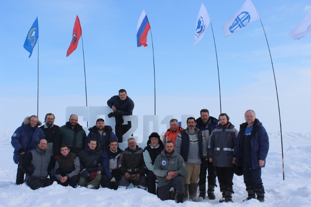 участники дрейфа